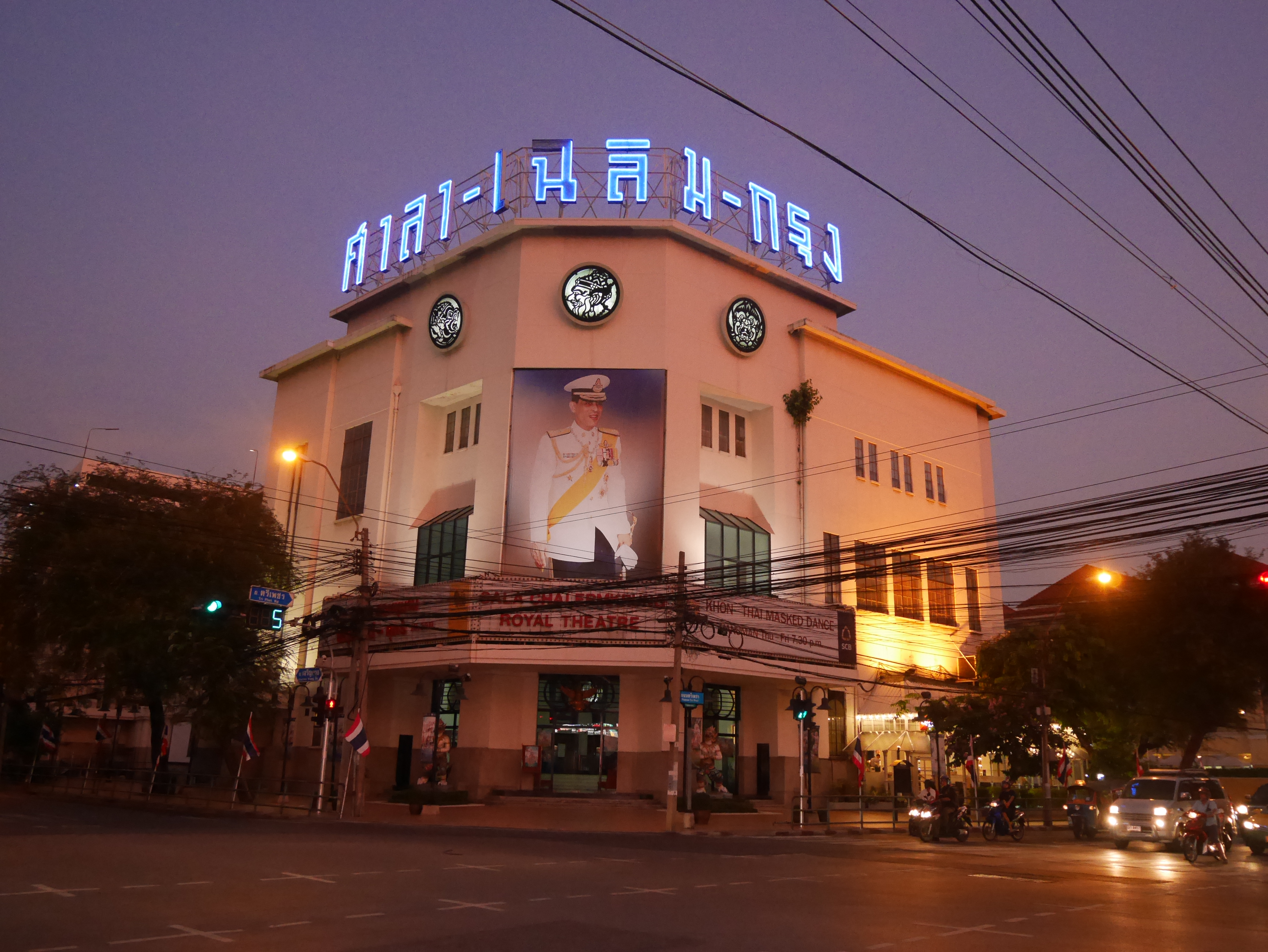 โรงภาพยนตร์ศาลาเฉลิมกรุง เจ้าของบัญชี กสิณธร ราชโอรส เป็นเจ้าของบัญชีเดียวกับ บัญชี Phonlakrit Sunthornphon ของ Facebook บัญชี Tsutomu RIkimi ของ Google และ Panoramio .com บัญชี ซูบารุโยของ กสิณธร ราชโอรส same account holder of Facebook (Phonlakrit Sunthornphon),Google and (Tsutomu RIkimi) and ซูบารุโย at